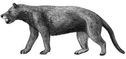 Ysengrinia americana.